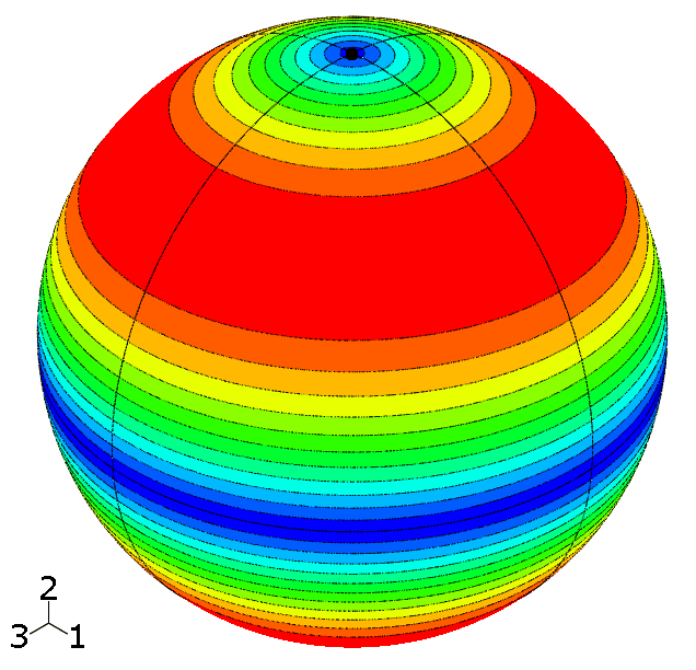 Auf eine Kugel projizierte Schubspannungen bei den Hauptspannungen σ1 = σ3 = 1 und σ2 = 0